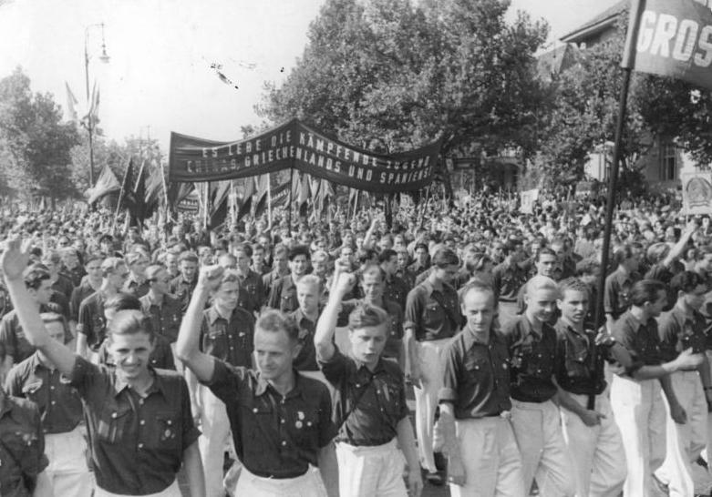 Budapest, II. Weltfestspiele, Festumzug, deutsche Delegation Zentralbild Ben Weltjugendspiele in Budapest beendet-Am 28.August 1949 verabschiedeten sich die ausländischen Delegierten der Weltjugendspiele von Budapest und seiner gastfreundlichen Bevölkerung.Eine große Schlußdemonstration, an der sich alle Delegierten beteiligten, bildeten den Abschluß der Festspiele.In endlos scheinenden Zügen zogen die Delegierten der einzelnen Nationen durch die Straßen der ungarischen Hauptstadt zum Heldenplatz, wo der stellv.Ministerpräsident Matyas Rakosi eine Ansprache hielt.Die Vertreter der Weltjugend gelobten dort, daß sie ihren Kampf für den Frieden bis zum Sieg fortsetzen werden UBz:Die deutsche Delegation.